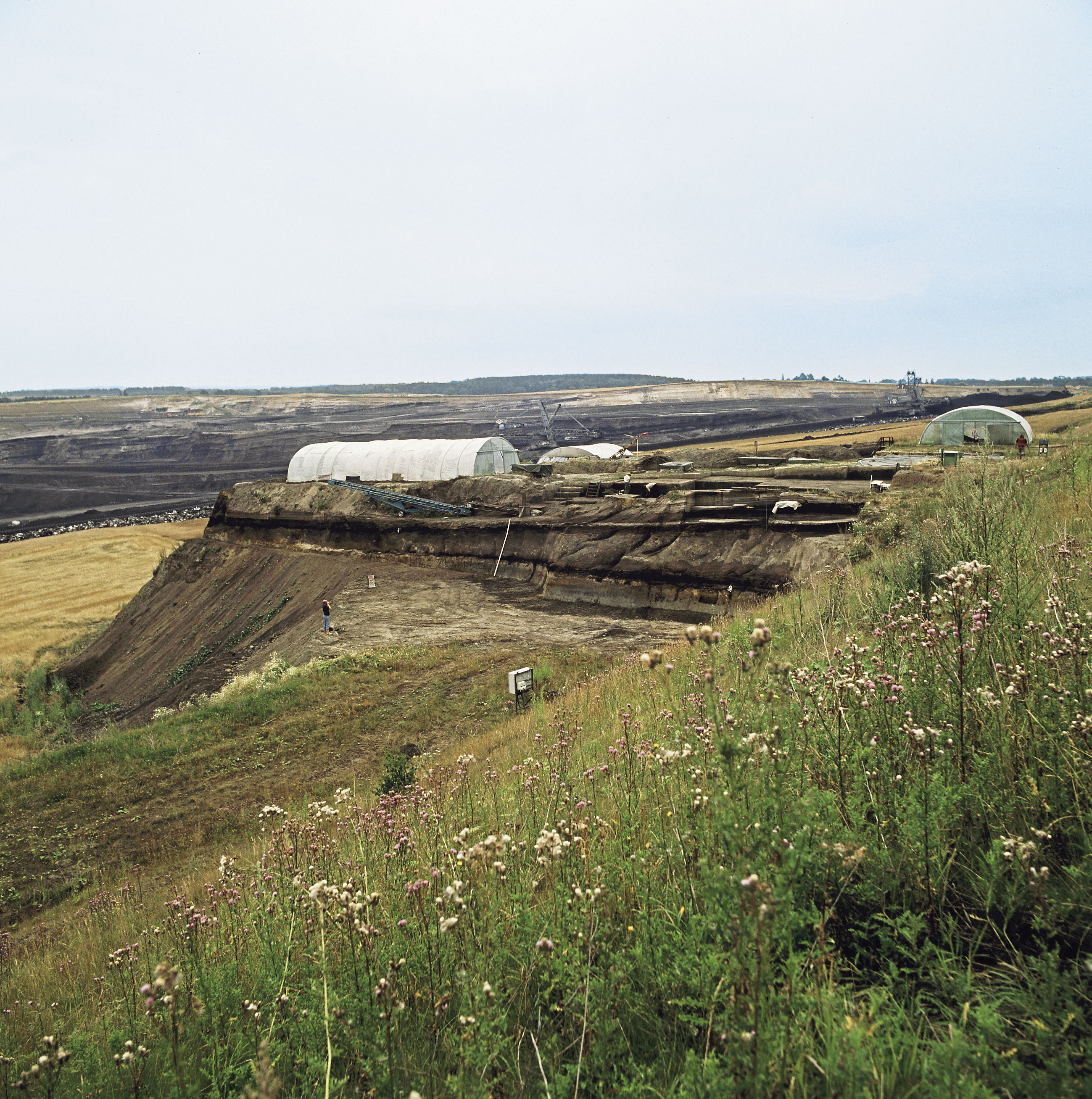 Blick auf die Fundstelle